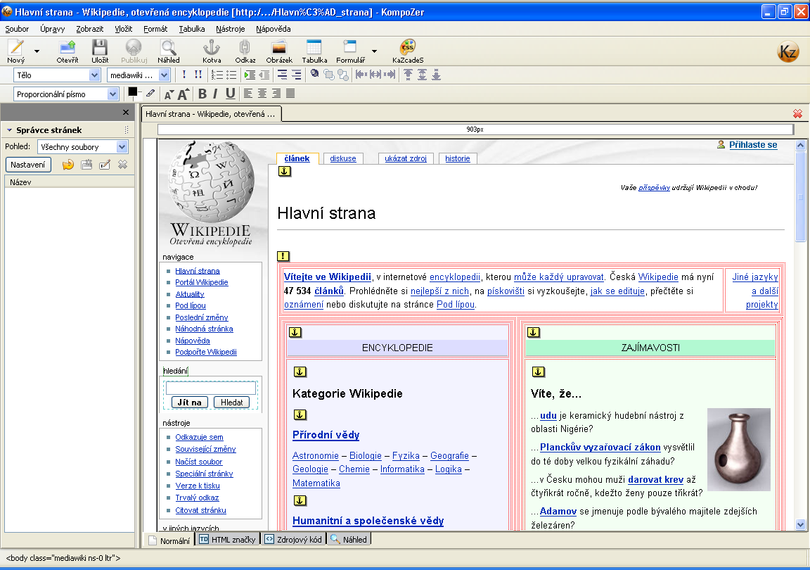 KompoZer